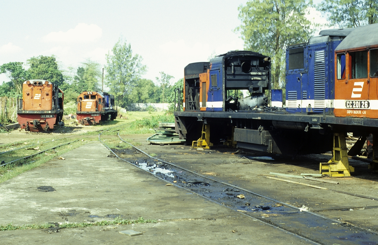 PTKACC201 (201 026 A)